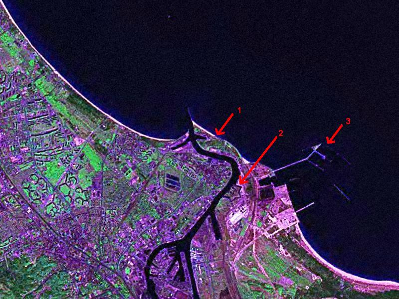 Gdańsk Nowy Port - zdjęcie satelitarne Landsat (wykonane około roku 2000). Na zdjęciu zaznaczono: Westerplatte Twierdzę Wisłoujście Port Północny